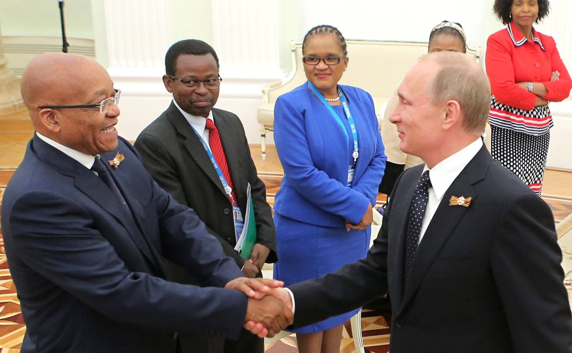 Встреча Владимира Путина с Президентом ЮАР Джейкобом Зумой